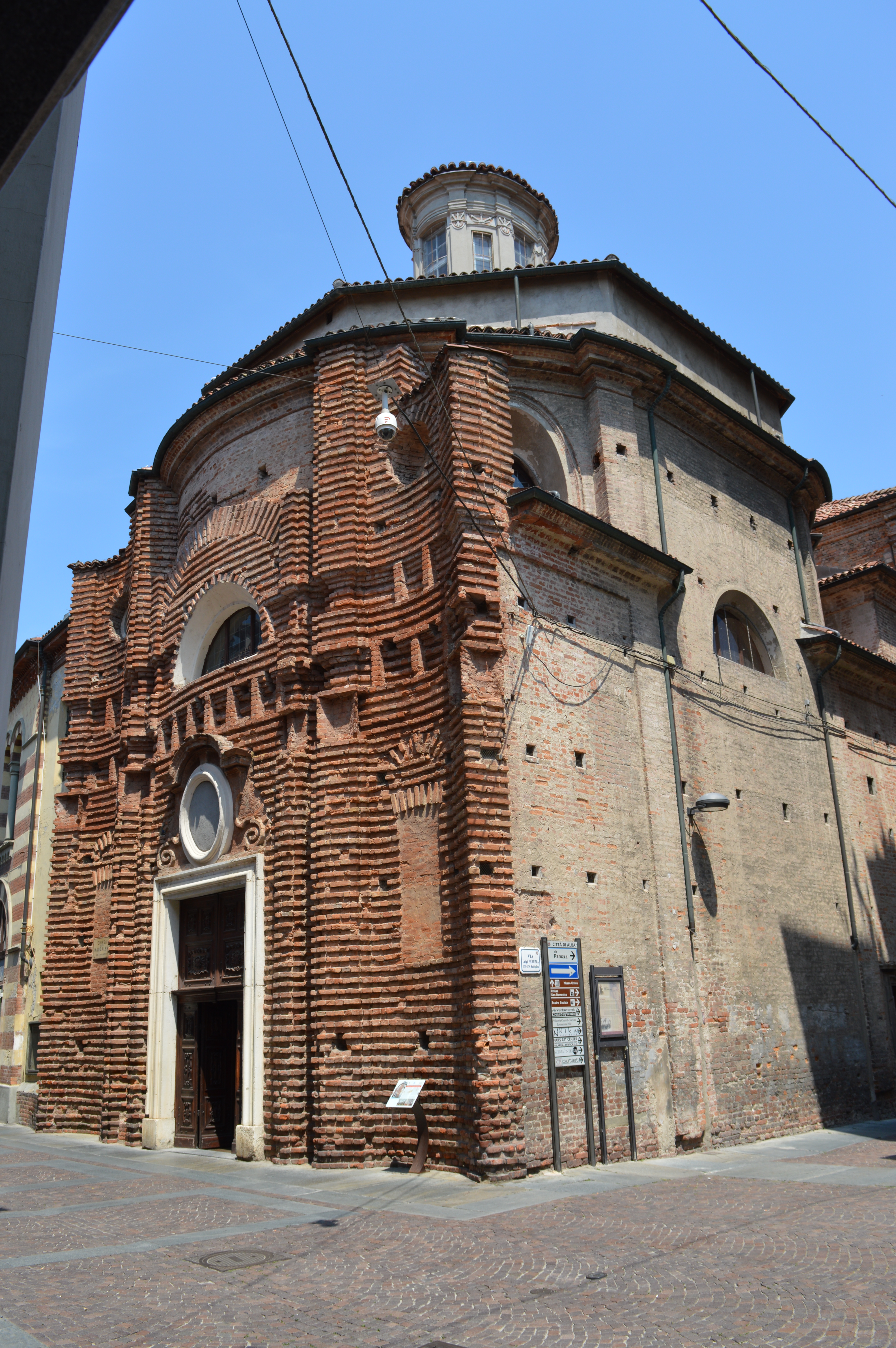 Chiesa della Maddalena ad Alba.